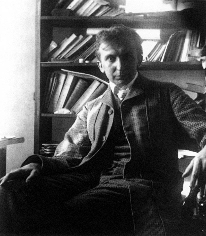 Porträtfoto des Architekten August Endell